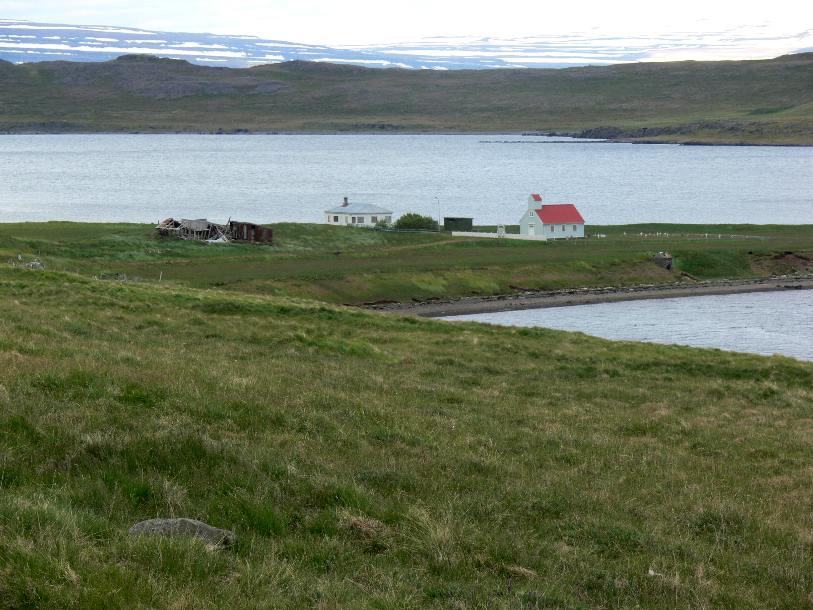 Kirche von Eyri im Fjord Seyðisfjörður im Ísarfjarðdardjúp